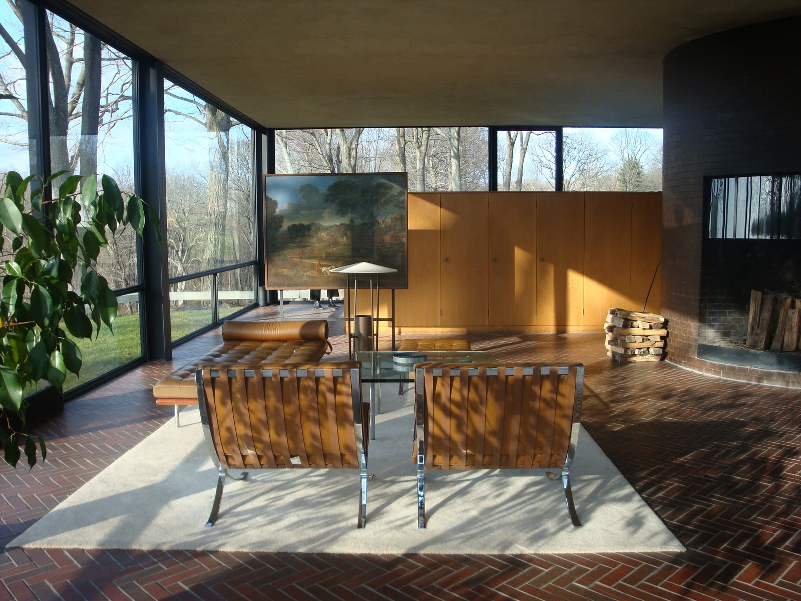 relacion del exterior con el interior